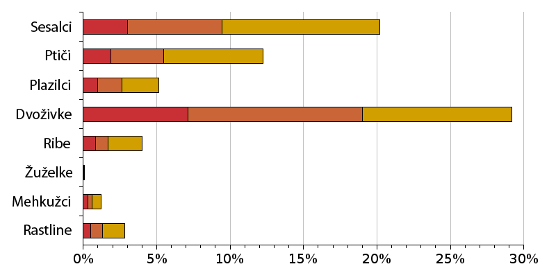 Odstotek vrst iz nekaterih skupin živih bitij, ki so vključene na Rdeči seznam IUCN